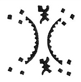 Клеймо "Гурда" (разновидность)